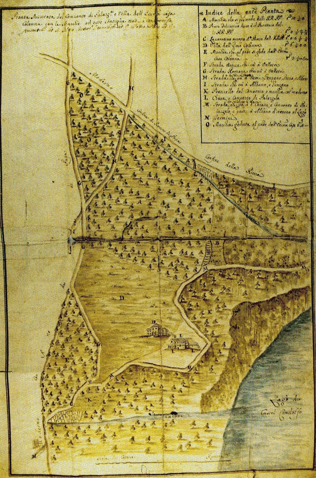 Terre di Palazzolo a Rocca di Papa (RM)